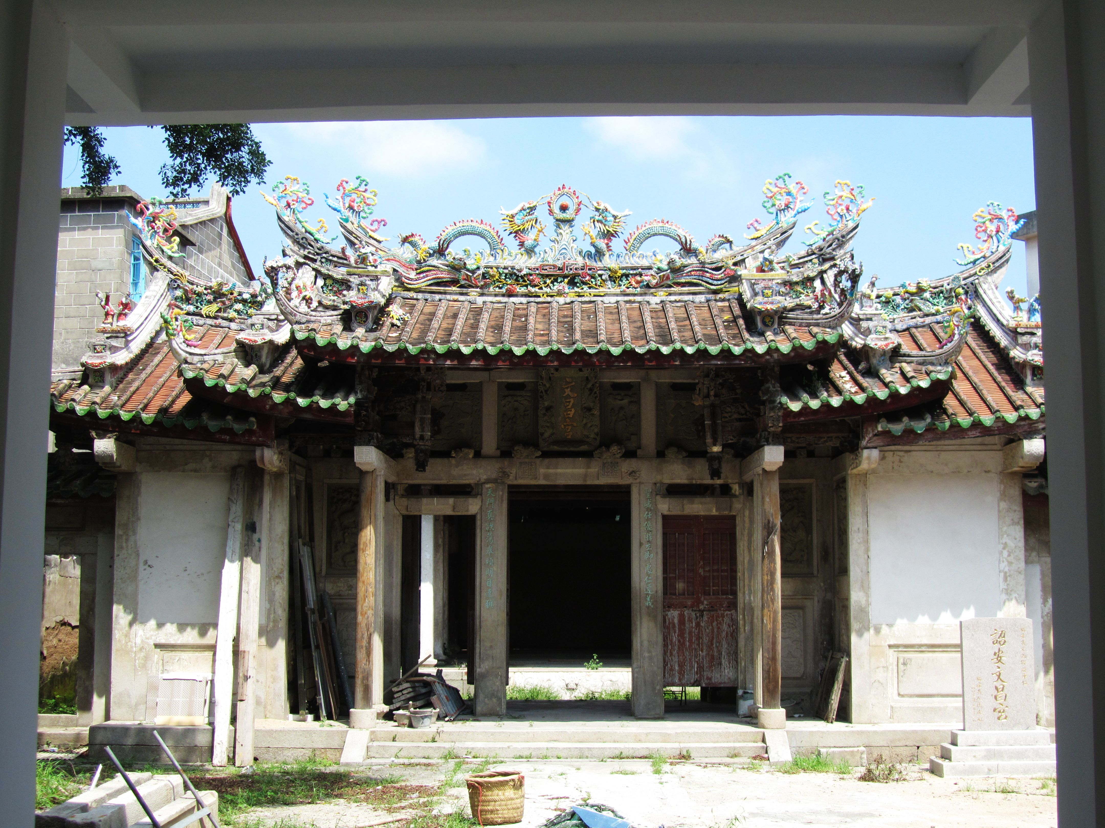 诏安文昌宫，大门。